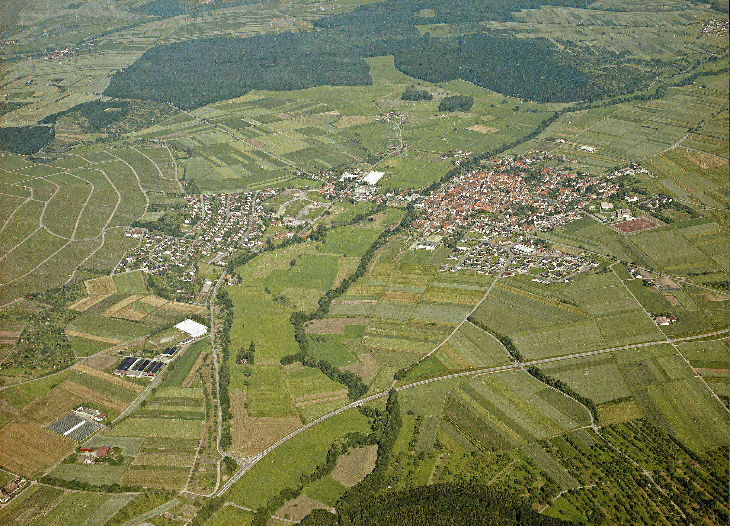 Horrheim und Südabdachung des Baiselsbergs